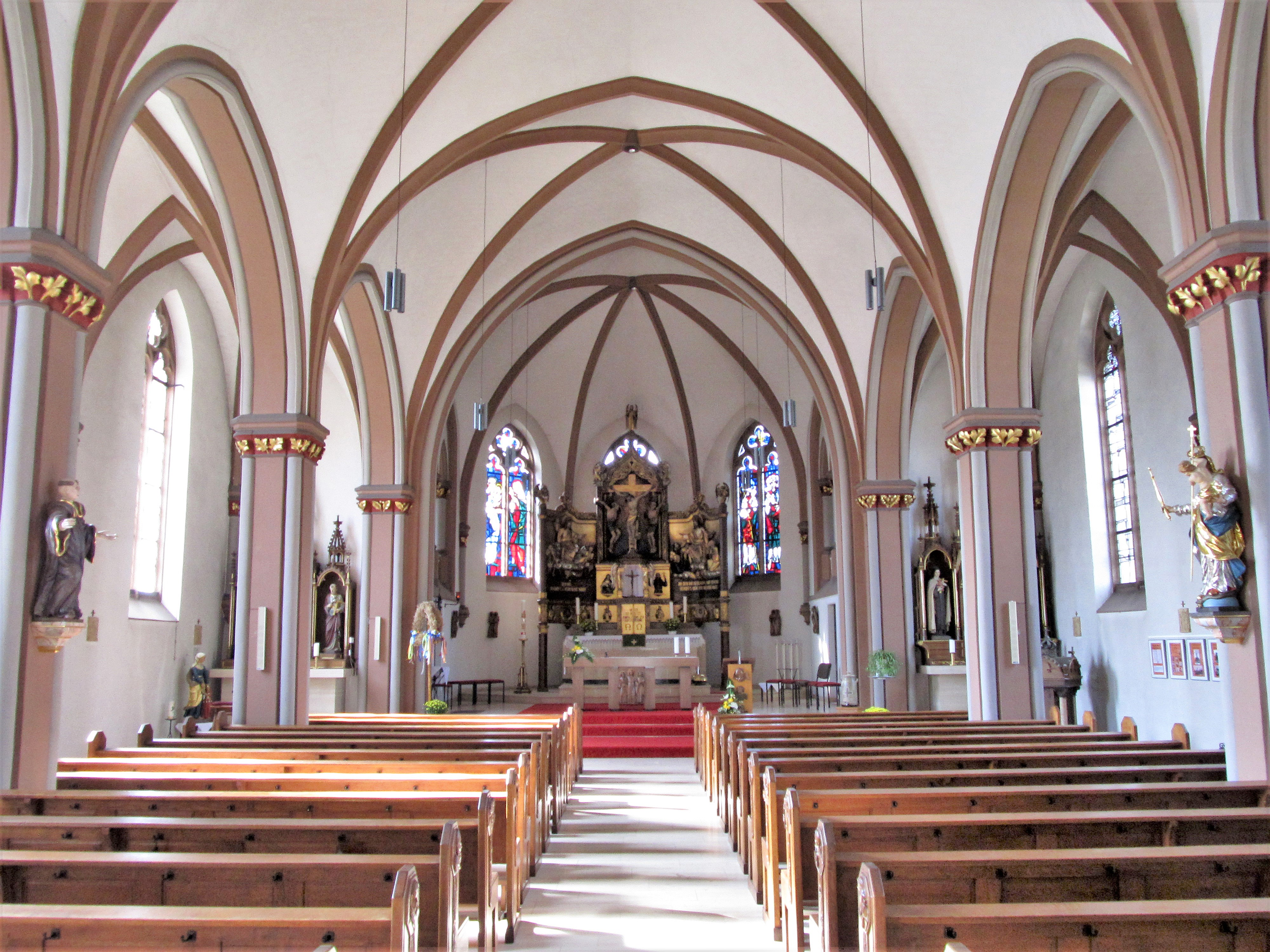 Blick ins Innere der katholischen Pfarrkirche St. Walfridus in Rilchingen-Hanweiler, einem Ortsteil der Gemeinde Kleinblittersdorf, Regionalverband Saarbrücken